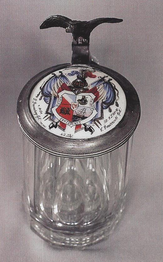 Bierkrug des Corps Masovia